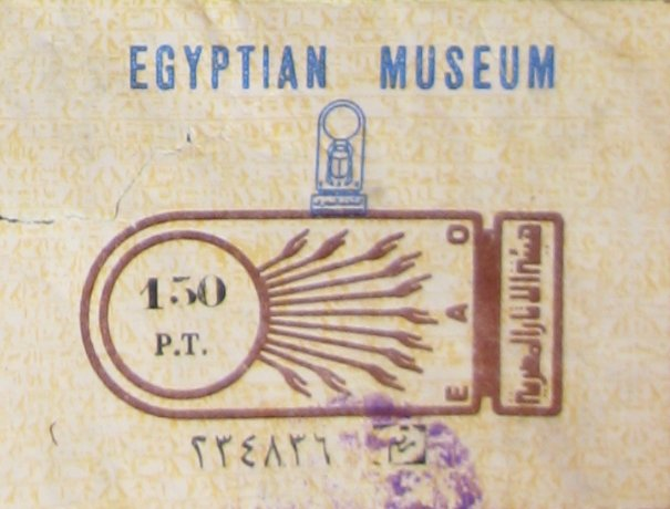 Egyptisch museum kaartje